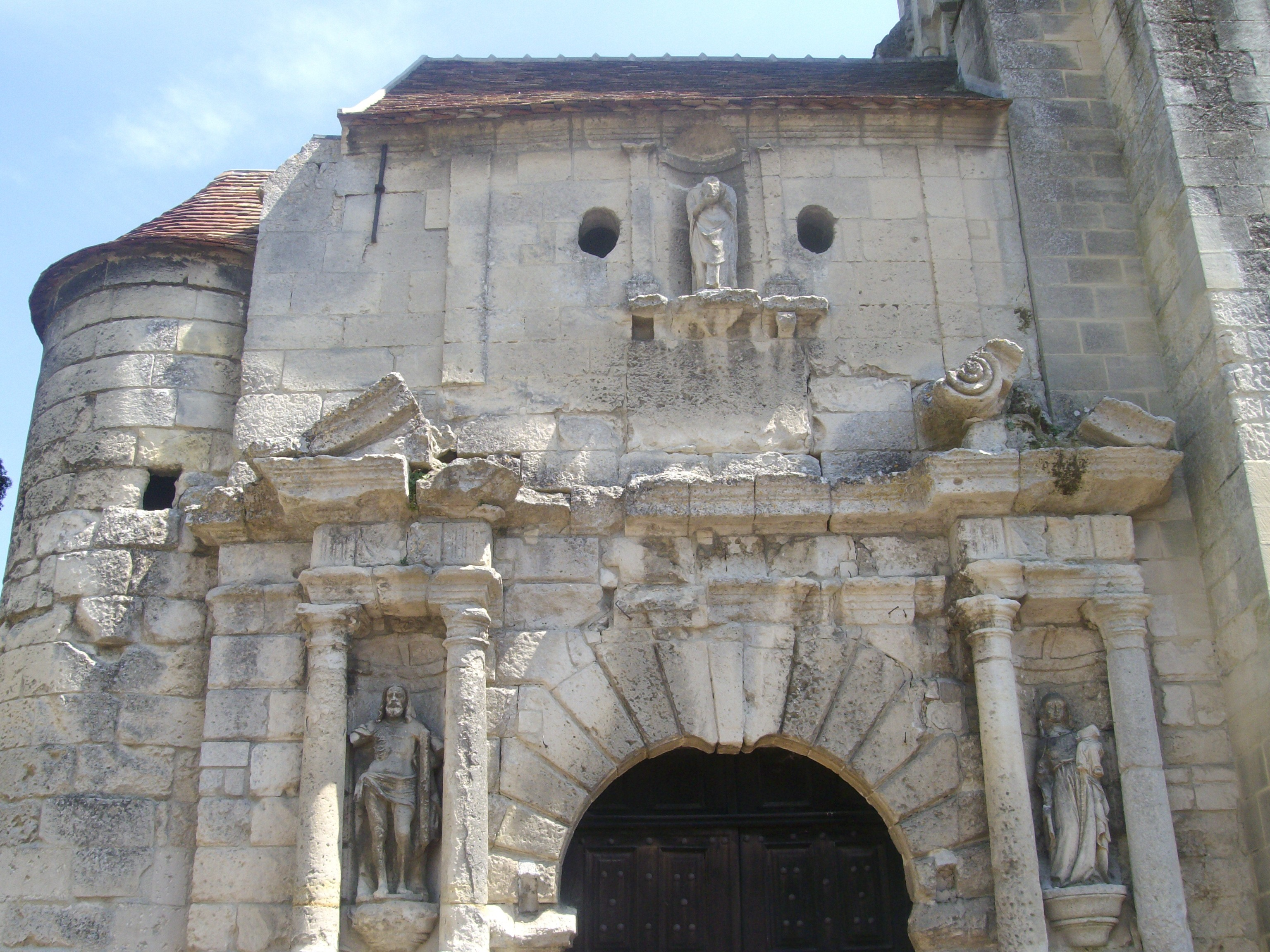 Détail de la façade occidentale de l'abbaye Notre-Dame de Morienval